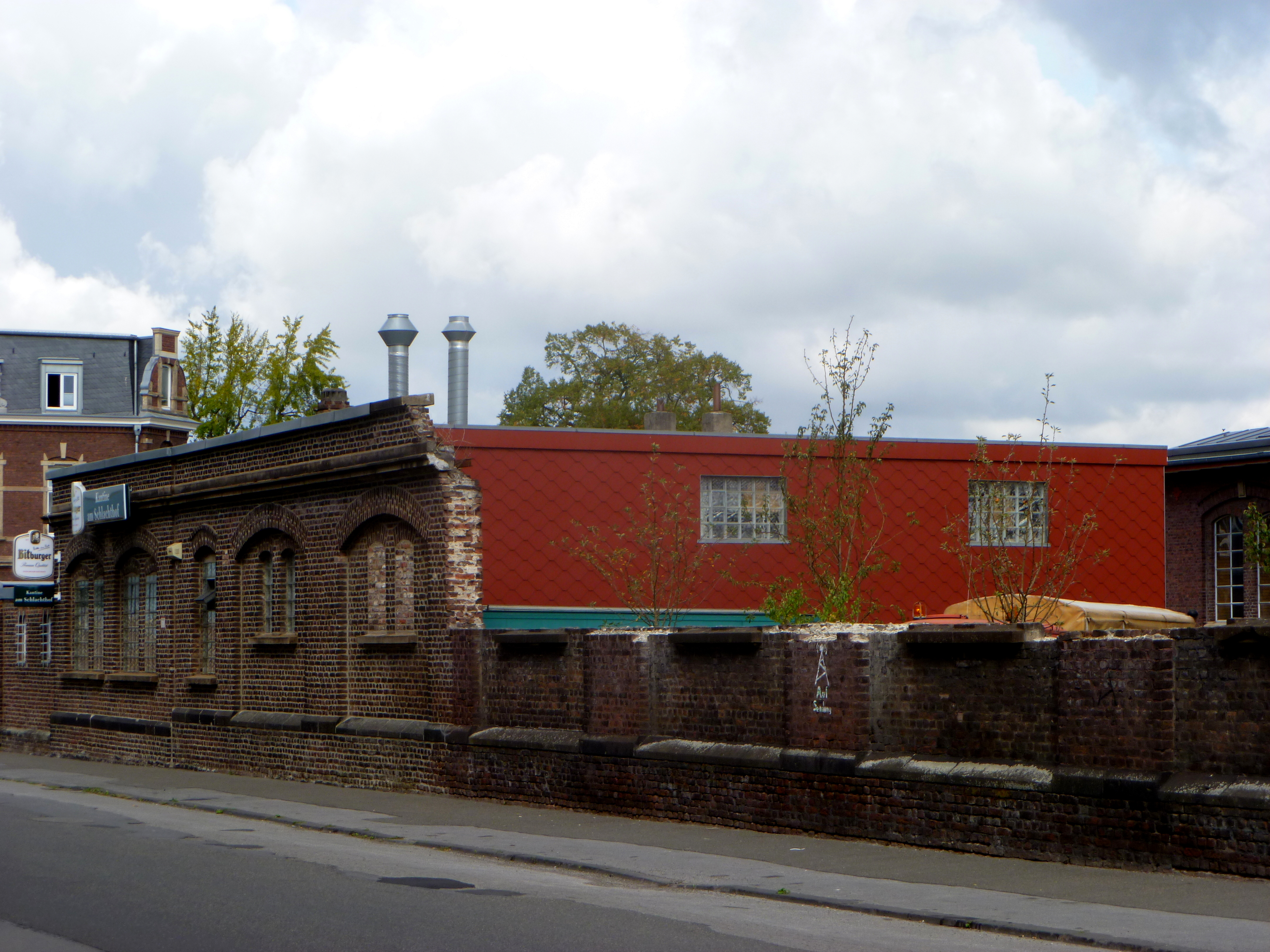 Alter Schlachthof Aachen; Kantine